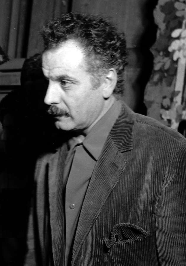 Théâtre du Capitole. Le 2 Décembre 1963. Vue de Georges Brassens.